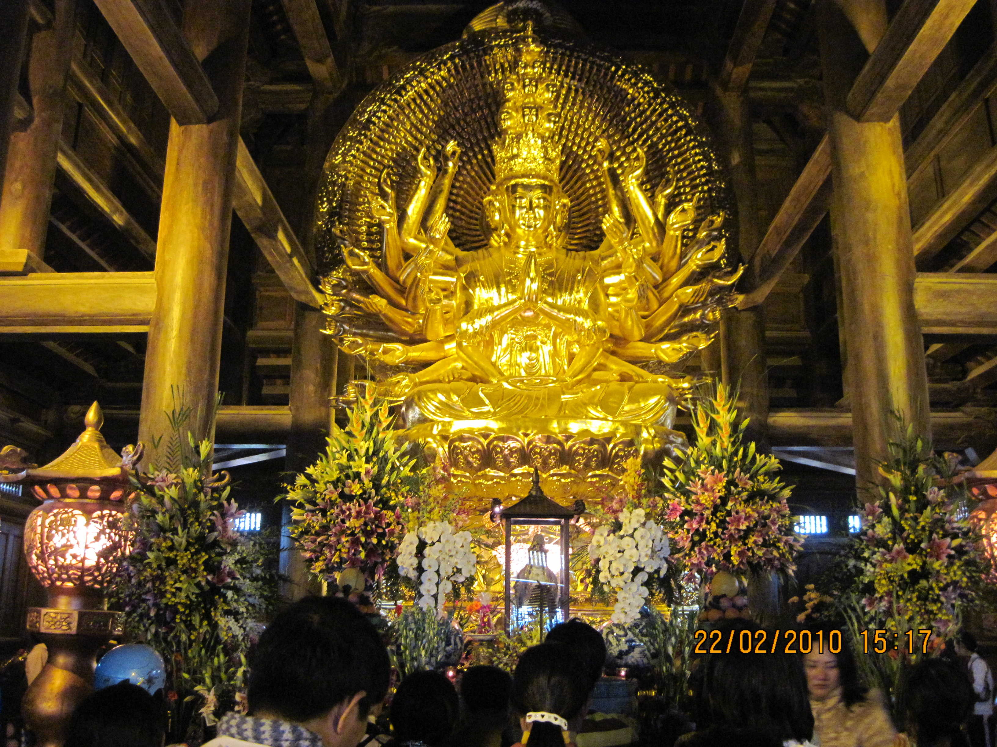 Tượng Quan Âm Chùa Bái Đính tỉnh Ninh Bình Thể loại:Phật giáo